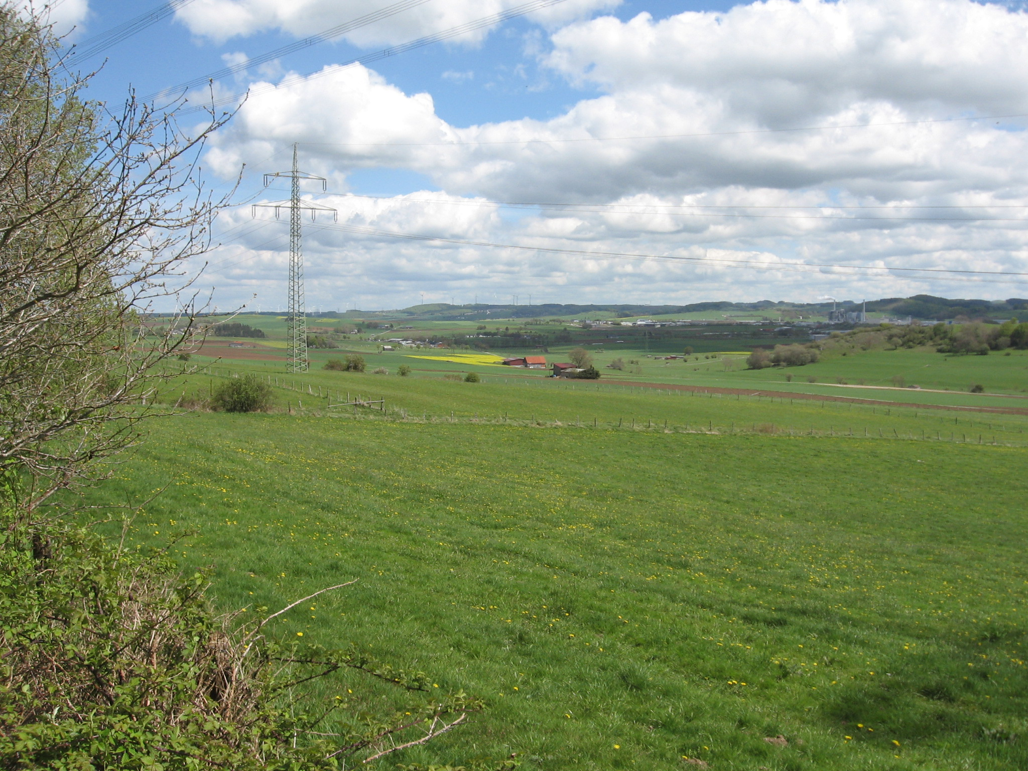 Landschaftsschutzgebiet Wintertal/Escherfeld: Blick von Landstraße Brilon nach Rixen nach Osten (Standpunkt am Waldrand nördlich von Niedermühle); Freileitungsmast (Bl. 1561)